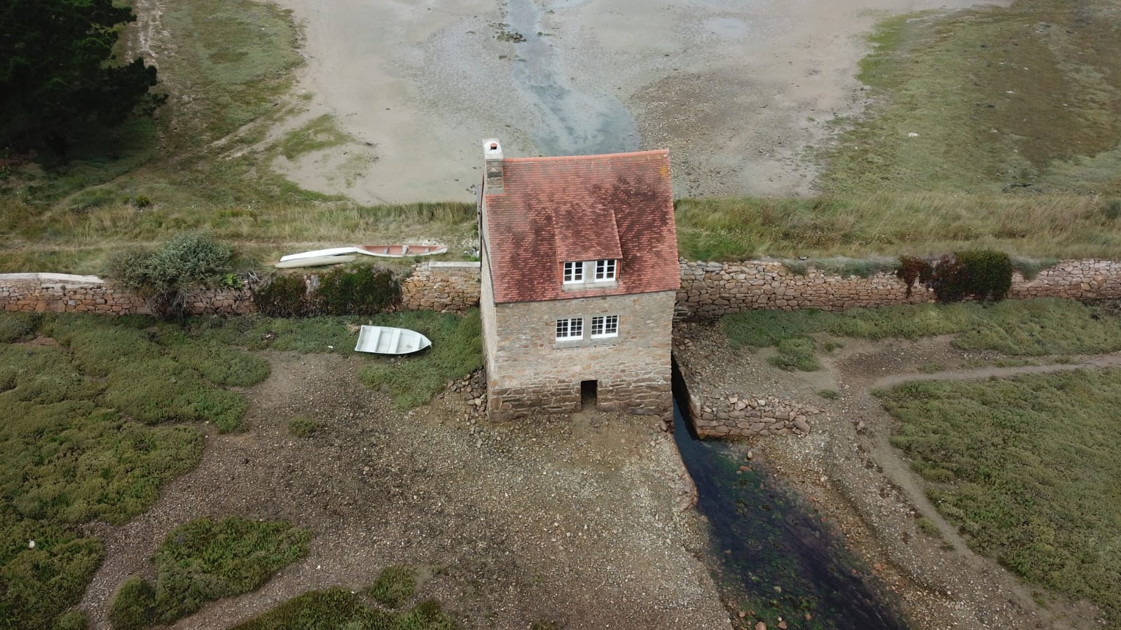 Moulin à marée du Bilo, à Buguélès